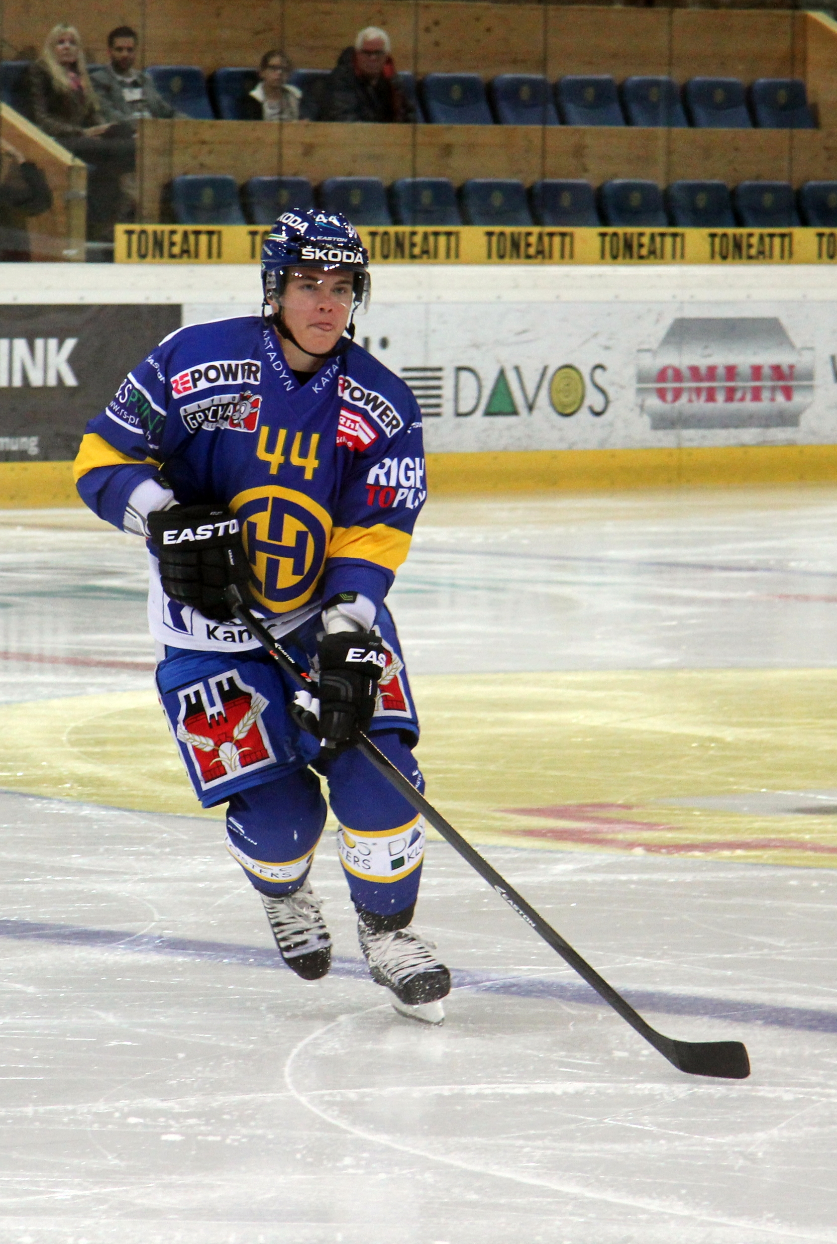 Ville Koistinen (D 44).